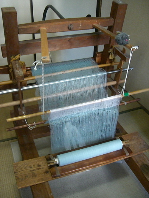 地機（結城紬）／投稿者Moraykaita撮影、2007年5月